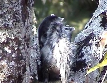 La mamá zarigüeya con los dos bebés trepados a ella